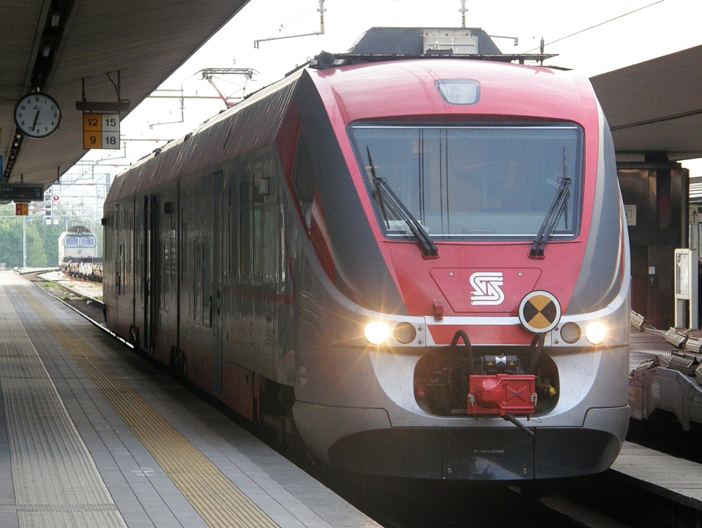 Der Lupetto in der "Stazione Centrale" in Pescara